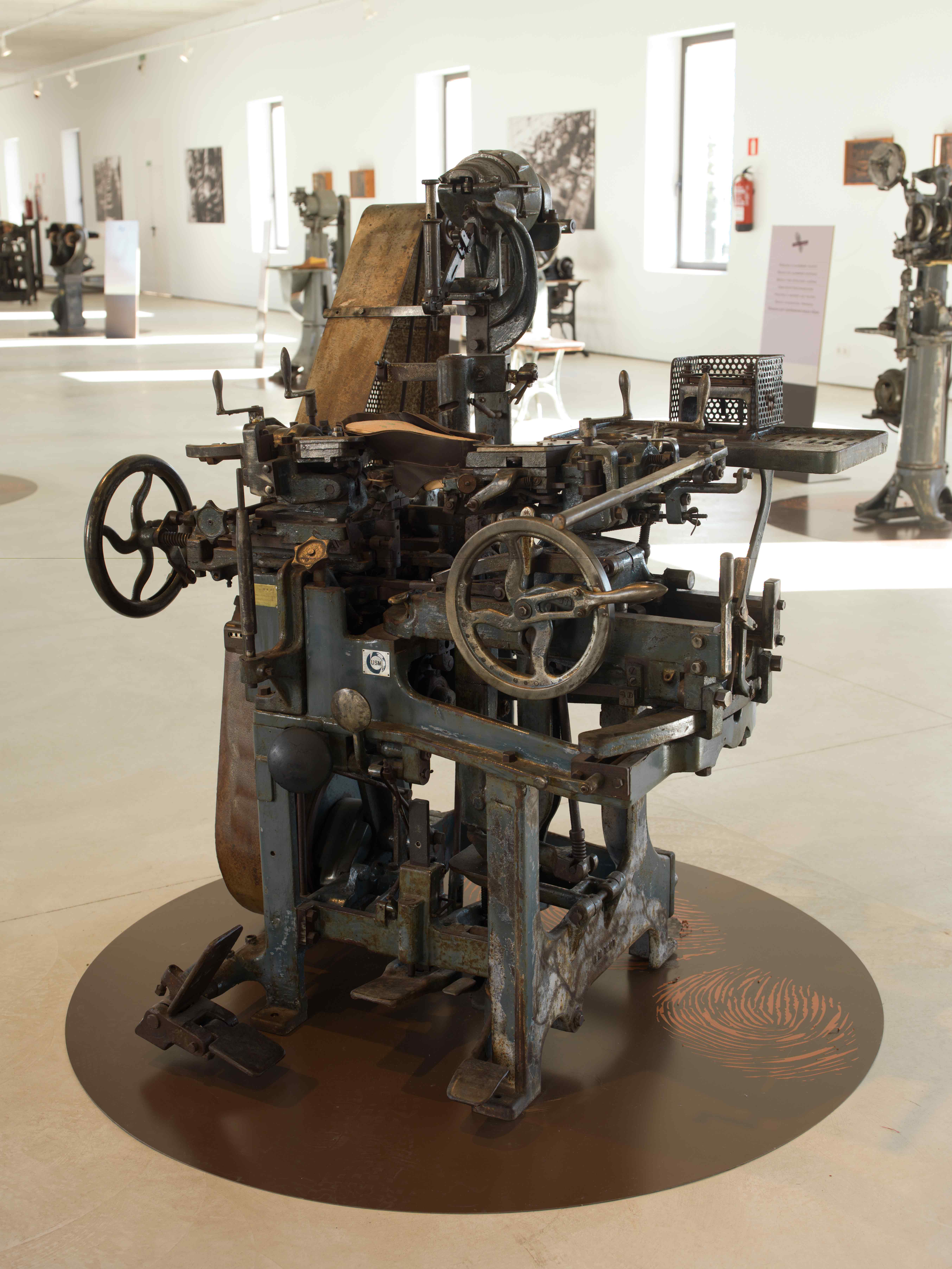 Máquina de montar punteras y taloneras (Joan Sastre)